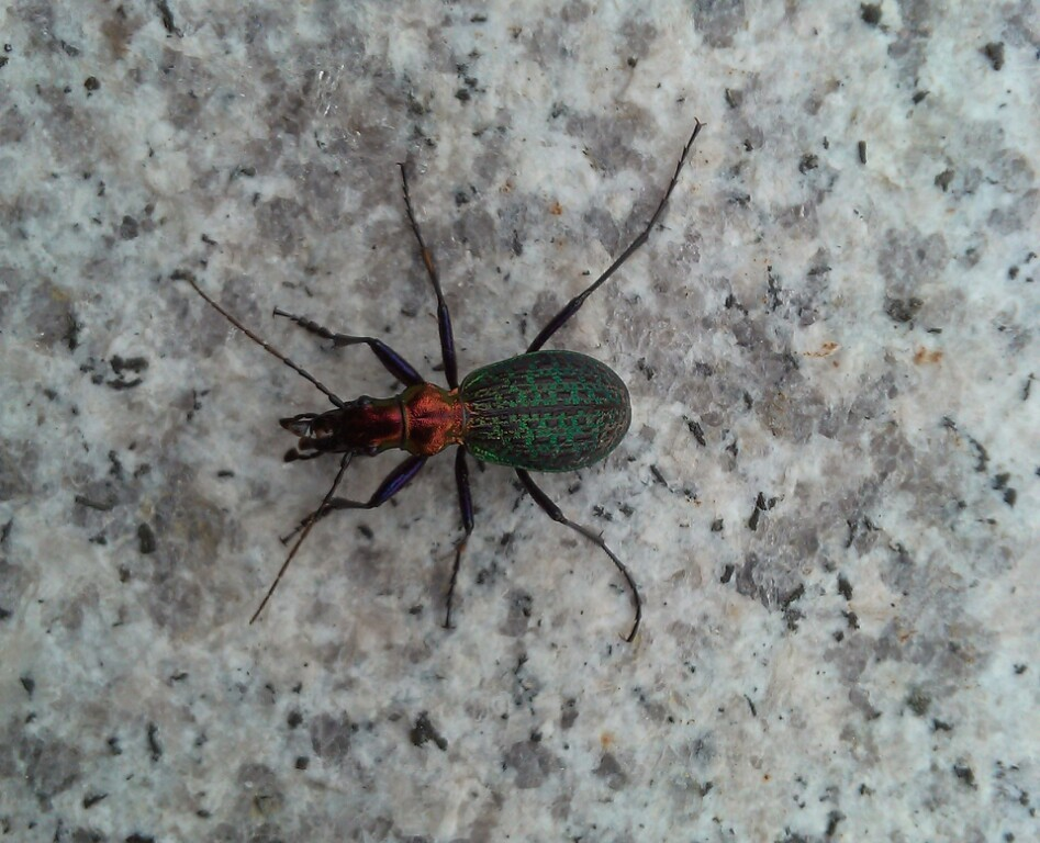 2013-05-14 대한민국 강원도 평창군 평창휴양림 촬영